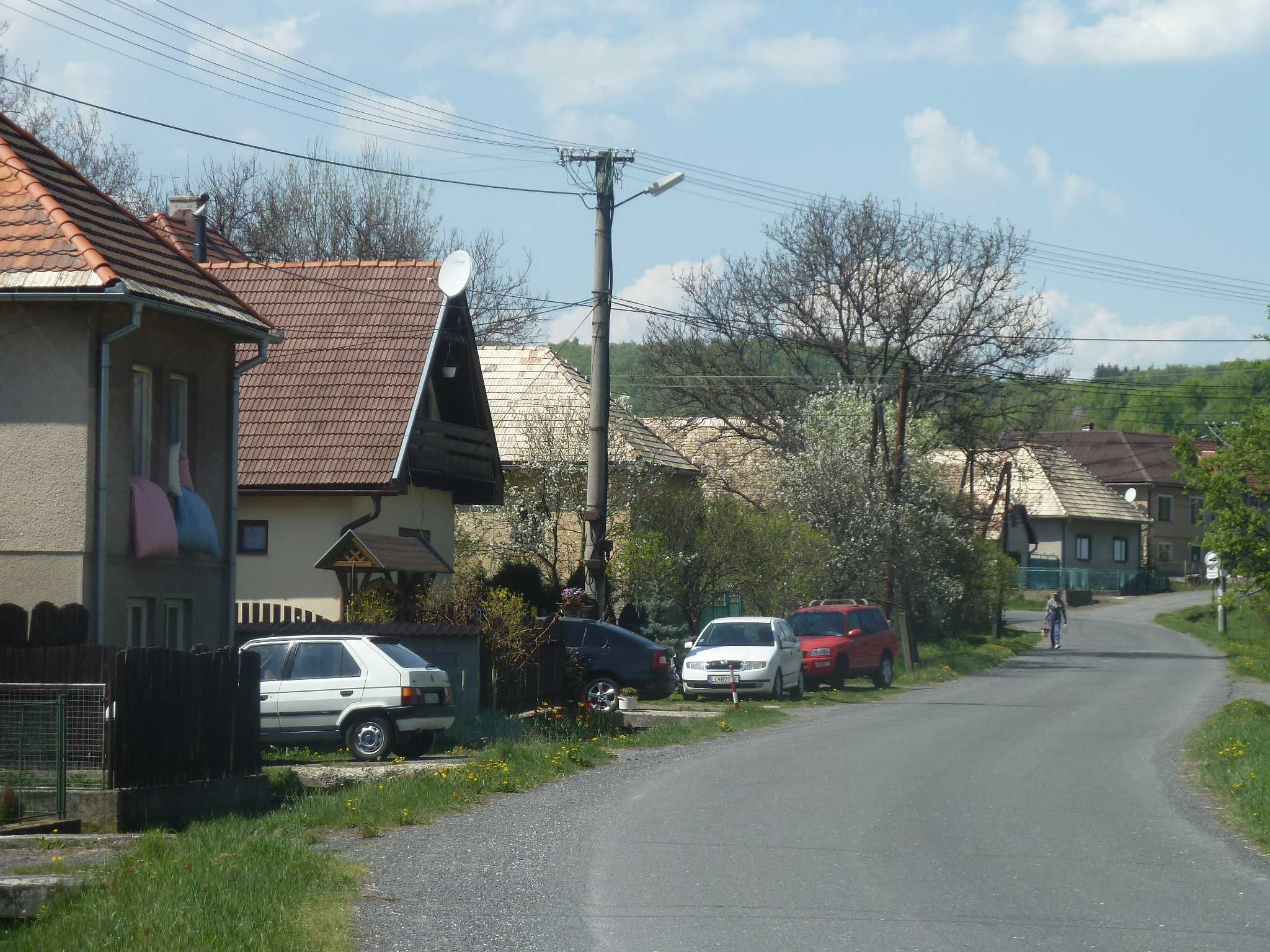 Obec Polichno